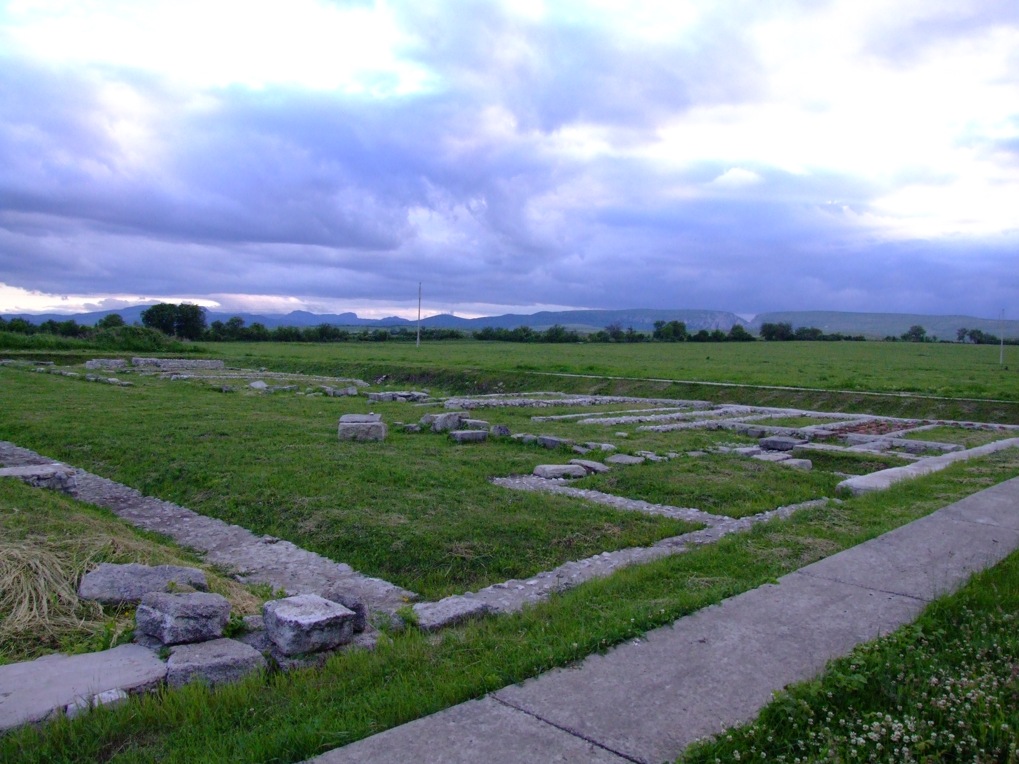 Castrul roman Potaissa